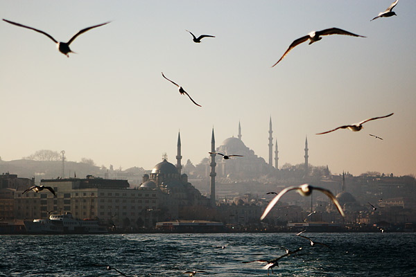 Istanbul'da çevre kirliliği